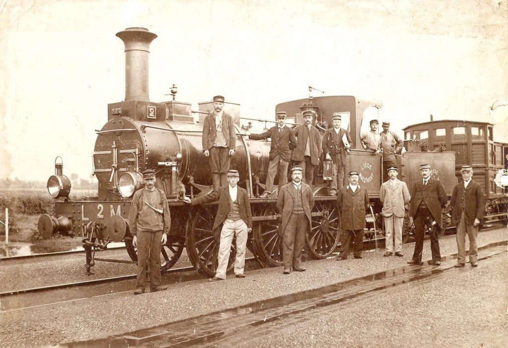 Groepsportret van het personeel van het L.M.-station Eijsden te Eijsden, waaronder stationschef J.J. Pick, bij de stoomlocomotief nr. 2 van de L.M. (L.M. = Compagnie du Chemin de fer de Liège à Maestricht et ses extensions).